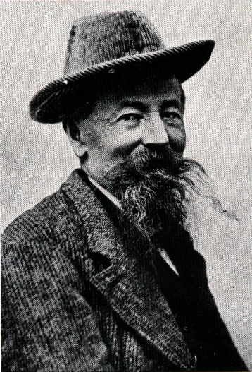 Jean-Estéril Charlet-Straton